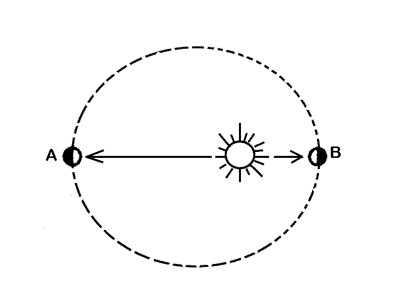 Aphelion of a planet